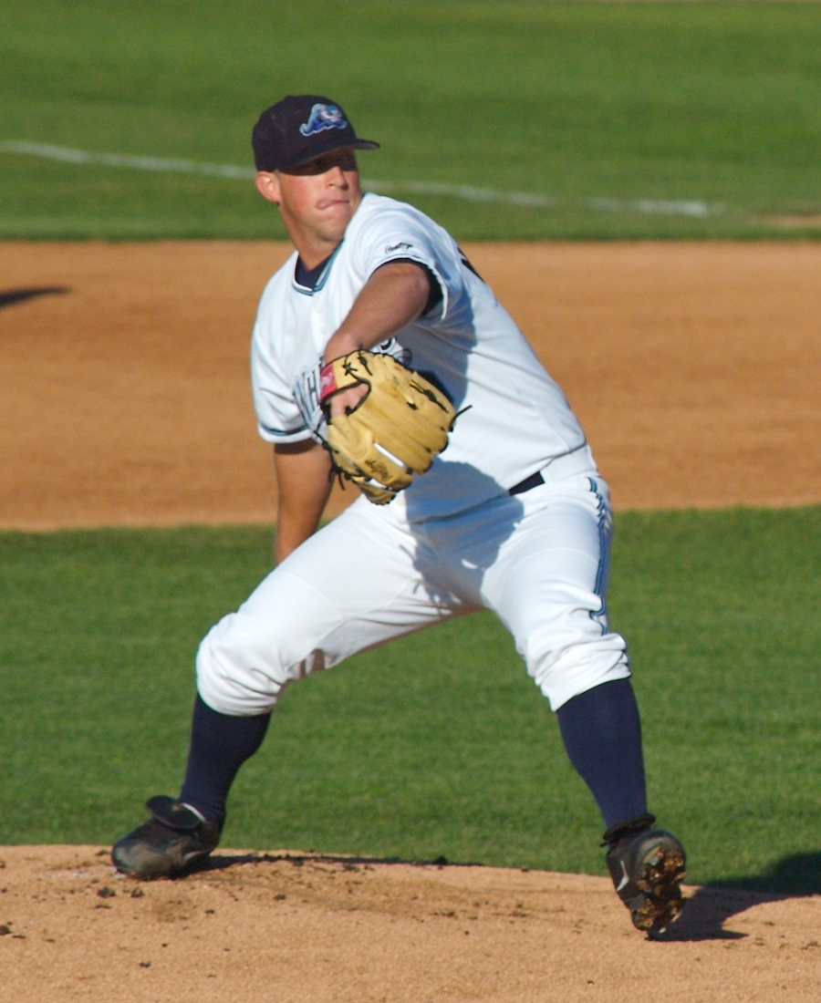 Jonah Nickerson